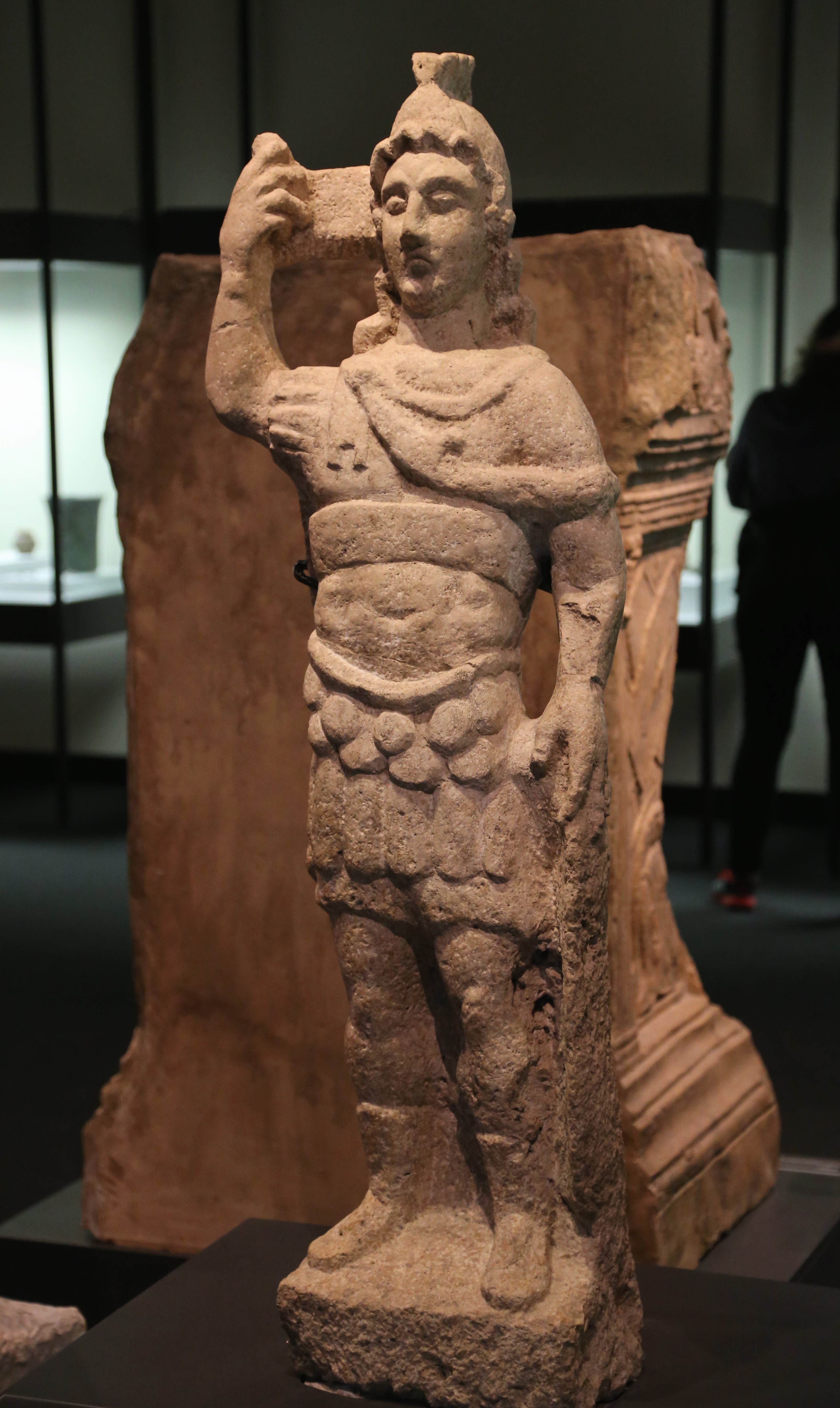 Statue des Mars in Feldherrenrüstung, Eining 3. Jh. n. Chr., Kalkstein, Archäologische Staatssammlung München